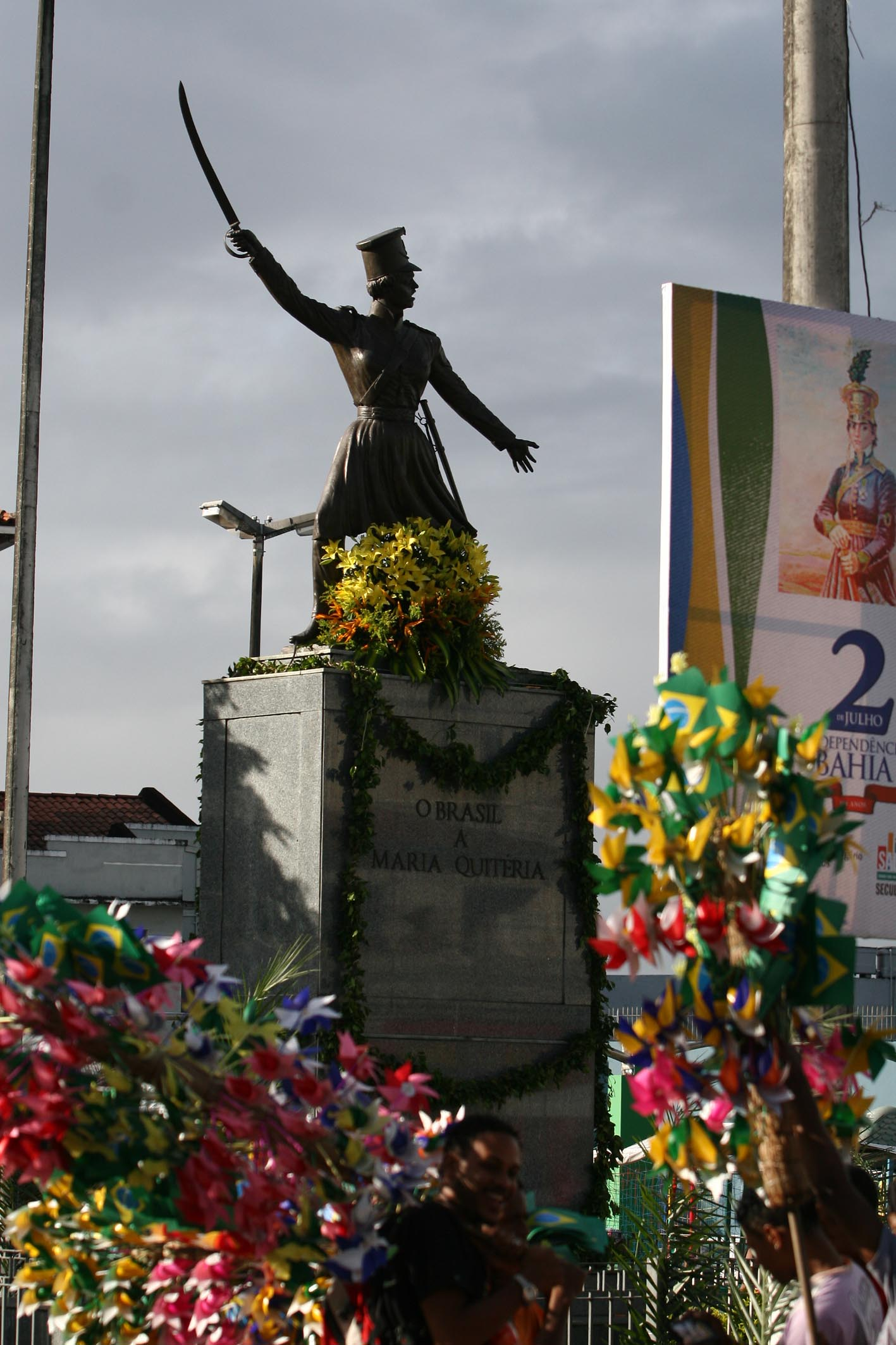 Baianos vão às ruas comemorar a Independência da Bahia. Foto Adenilson Nunes/Secom. Local Largo da Lapinha ao Pelourinho